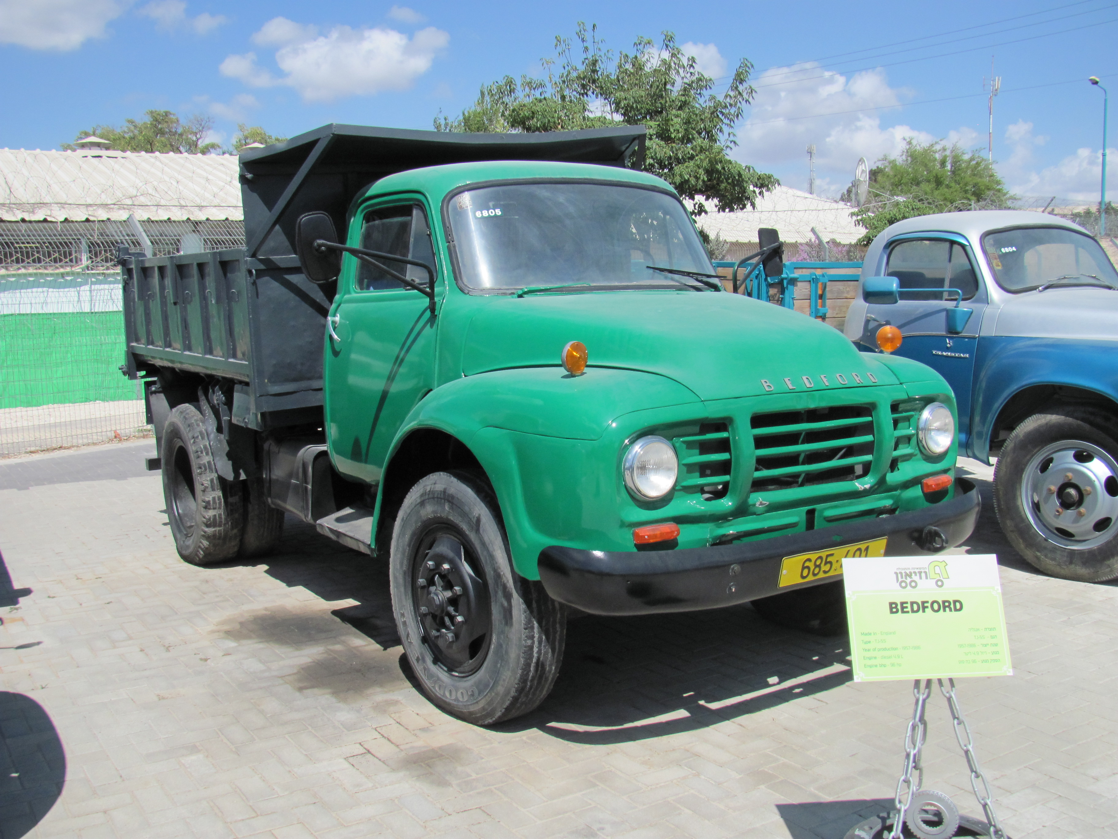 מוצג במוזאון המשאיות ברמלה